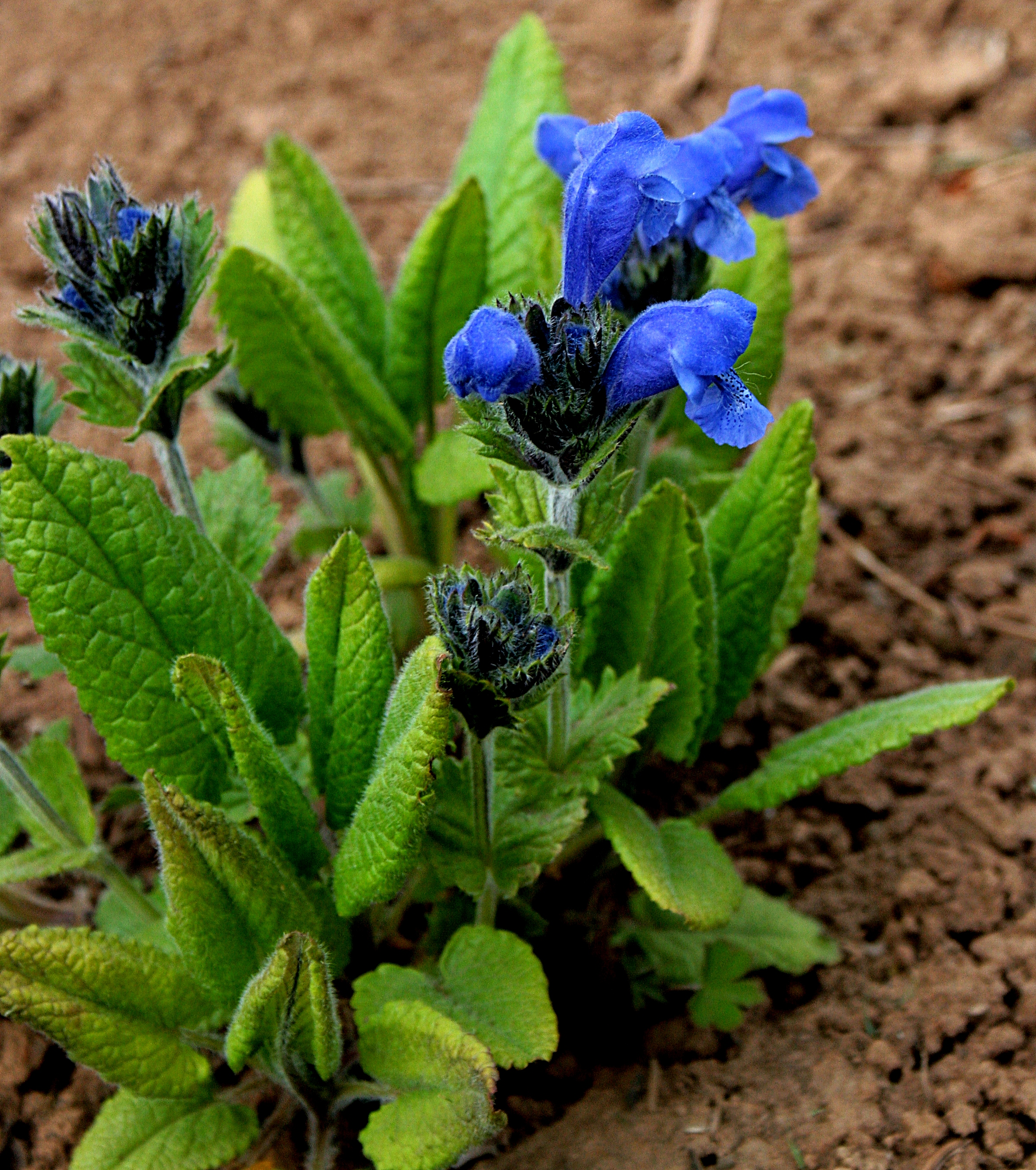 Ísland, Akureyri Botanical Gardens: Großblütiger Drachenkopf (Jón formaður)